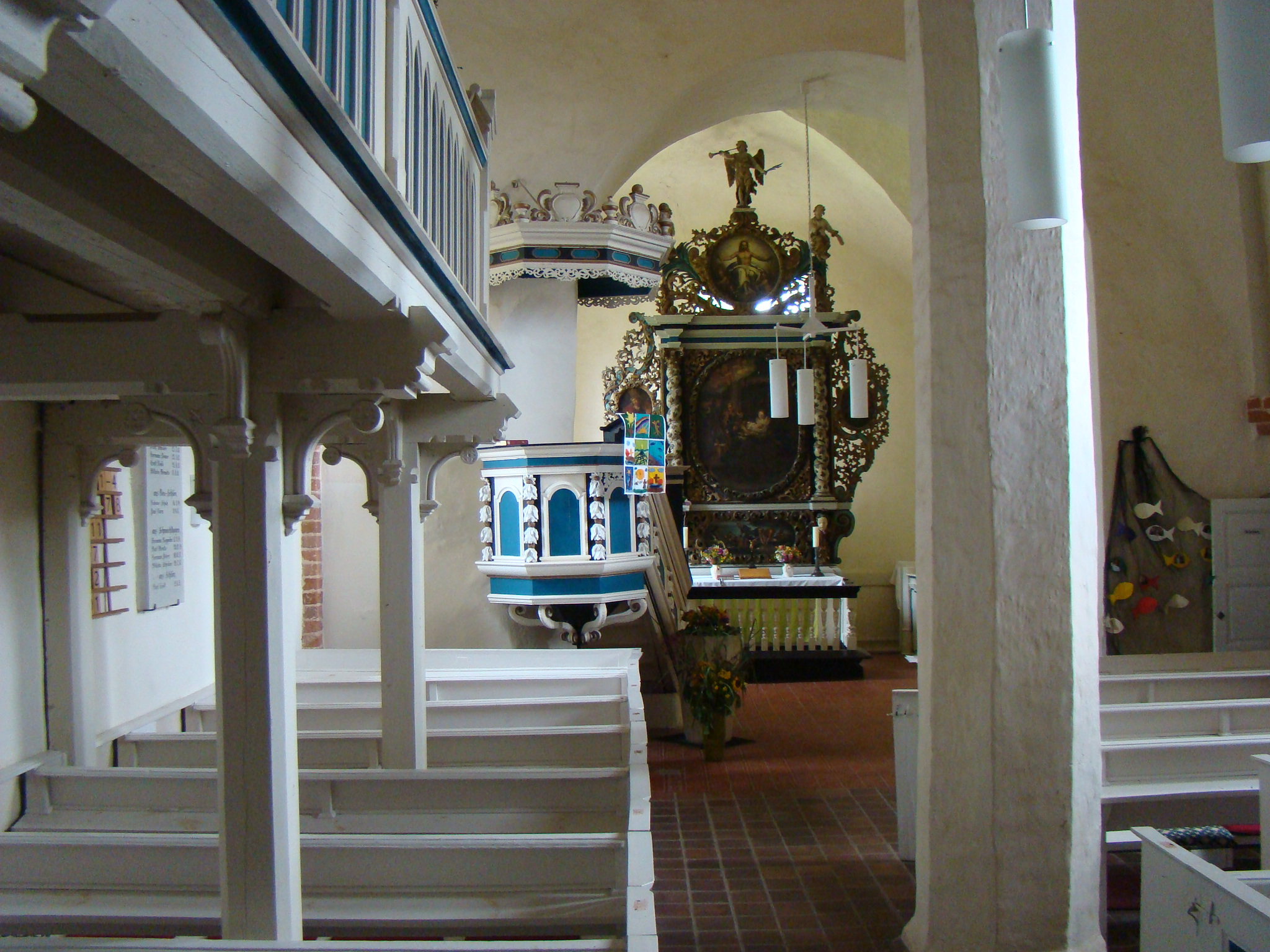 Kirche in Schloen. Foto: Peter Schmelzle, 2011.